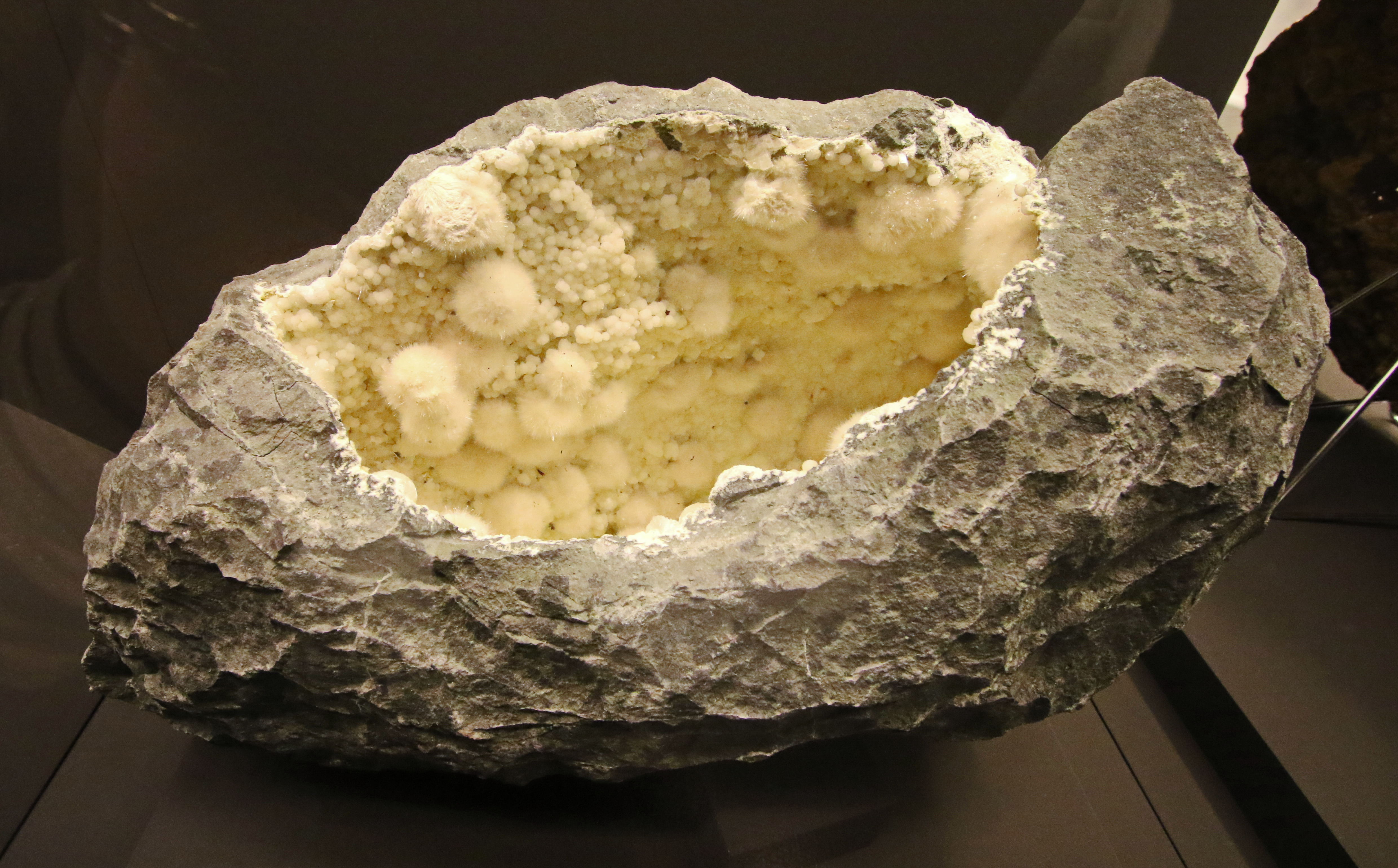 Okenit, Gyrolith, Prehnit. Indien. Terra Mineralia. Mineralienausstellung TU Bergakademie Freiberg.